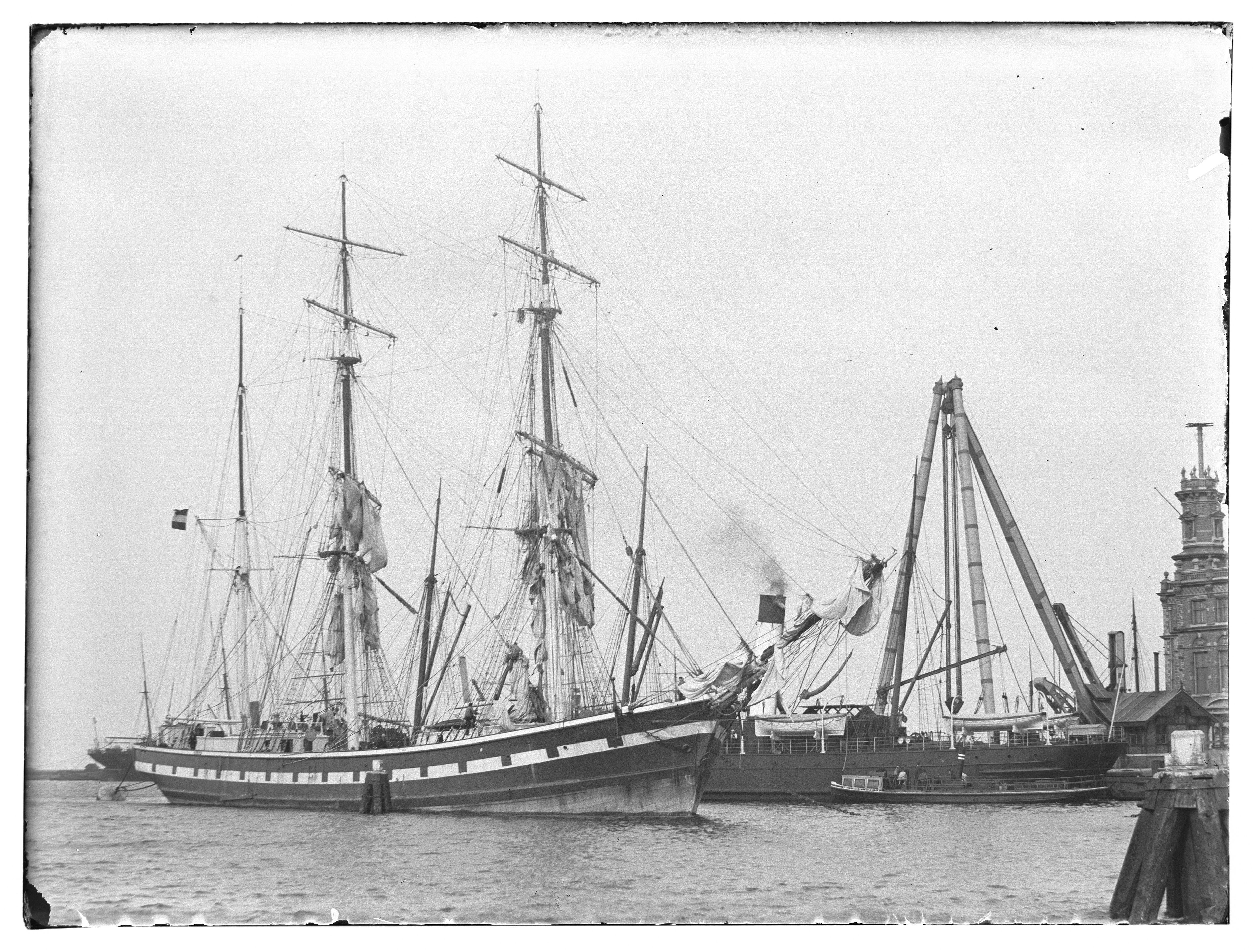 Beschrijving IJ (Afgesloten) Composietbark 'Baarn' (1879-1899)``, reder J.F.Meursing``, Amsterdam. Documenttype foto Vervaardiger Olie``, Jacob (1834-1905) Collectie Collectie Jacob Olie Jbz. Datering 1 augustus 1895 Geografische naam IJ Inventarissen Afbeeldingsbestand 010019000801 Generated with Dememorixer